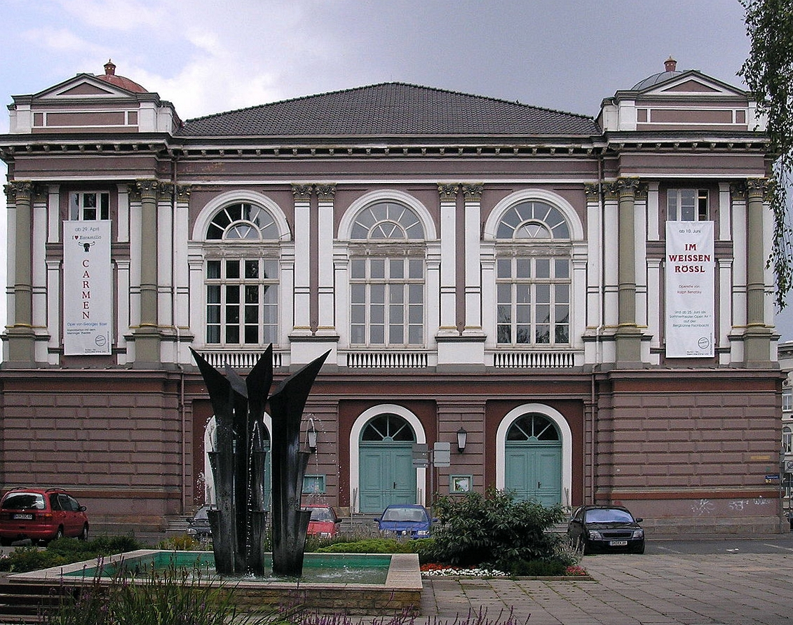 Das Theater von Eisenach (Thüringen).